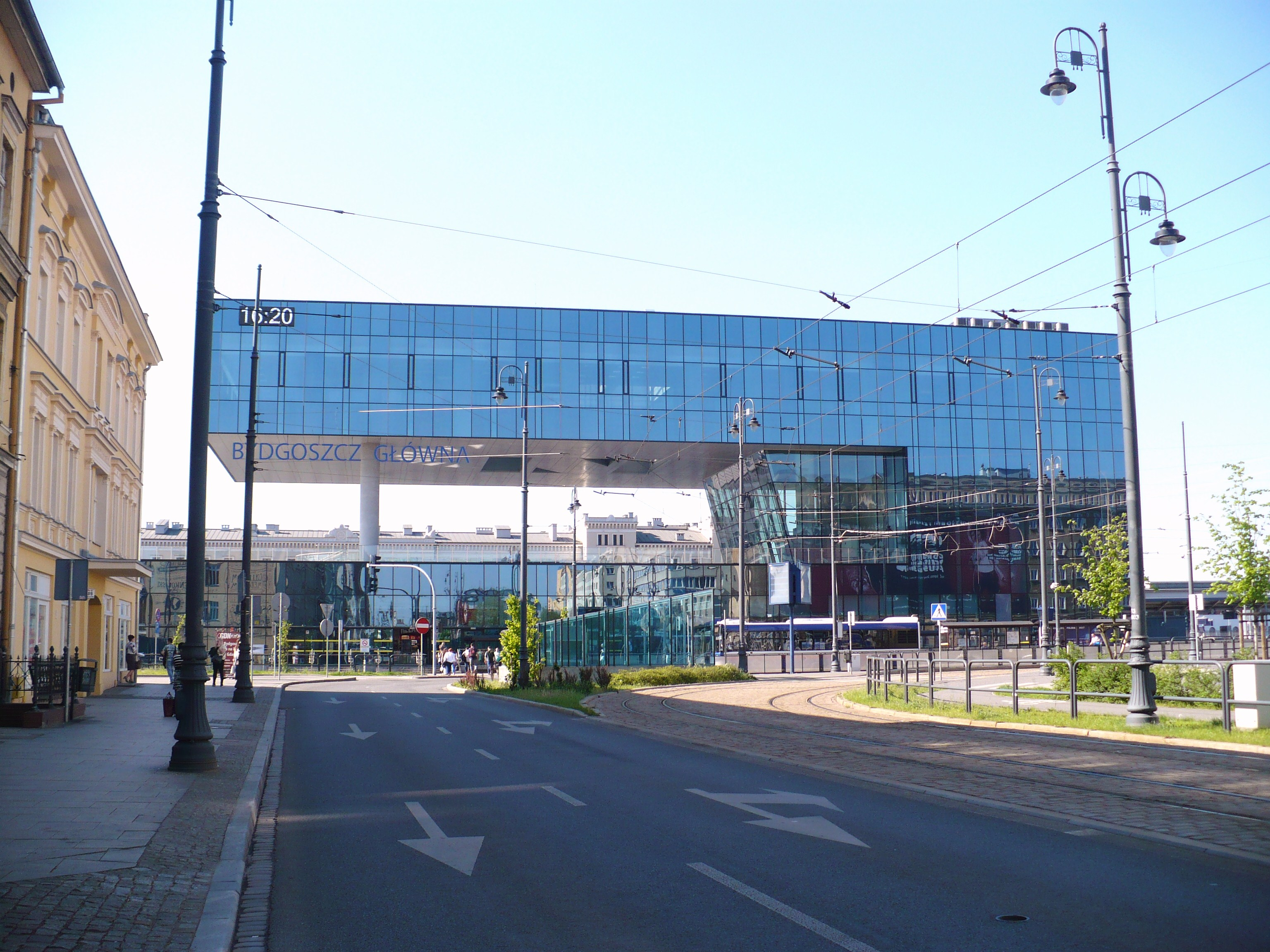 Terminal główny dworca